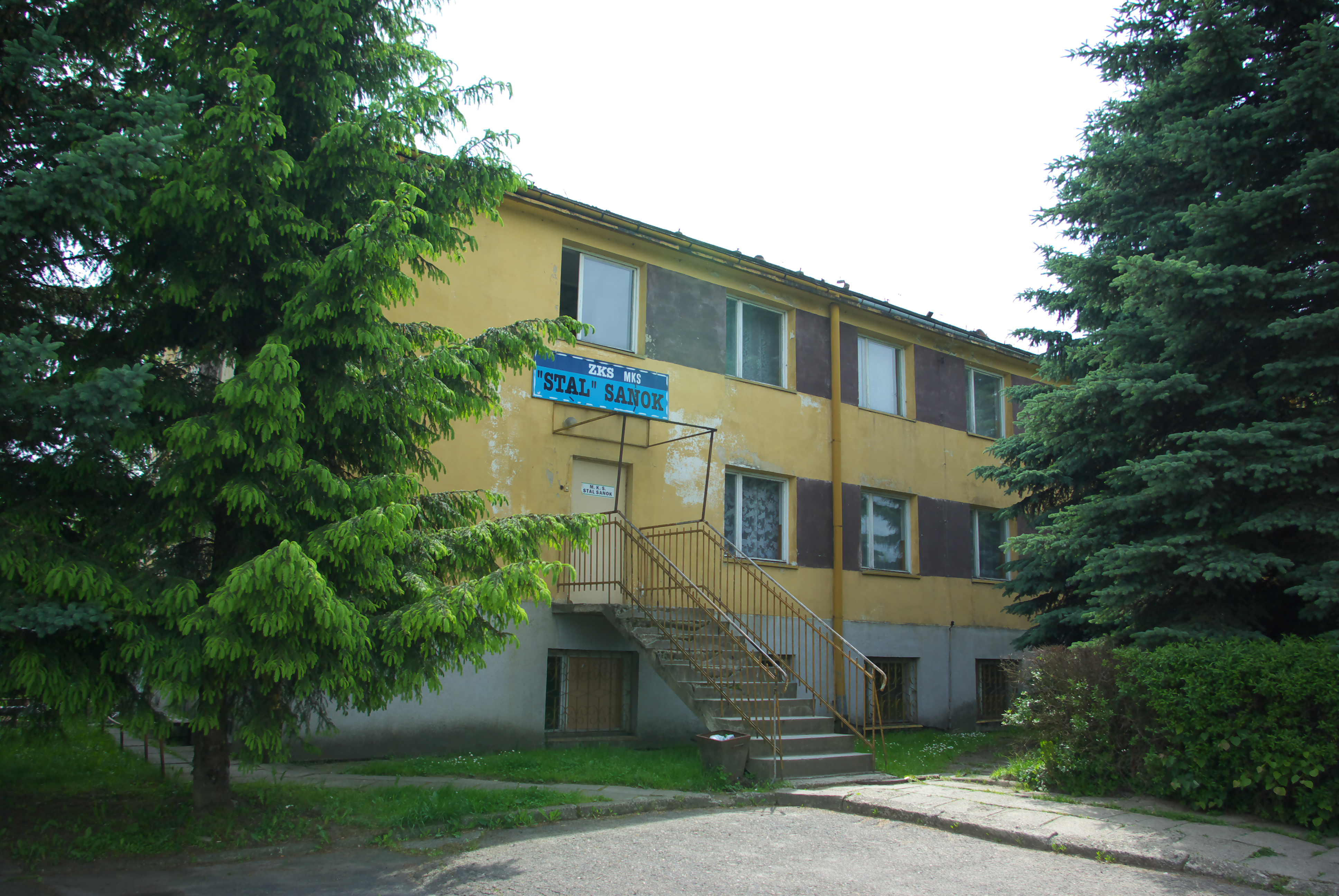 Budynek przy stadionie Stali Sanok ulica Stróżowska